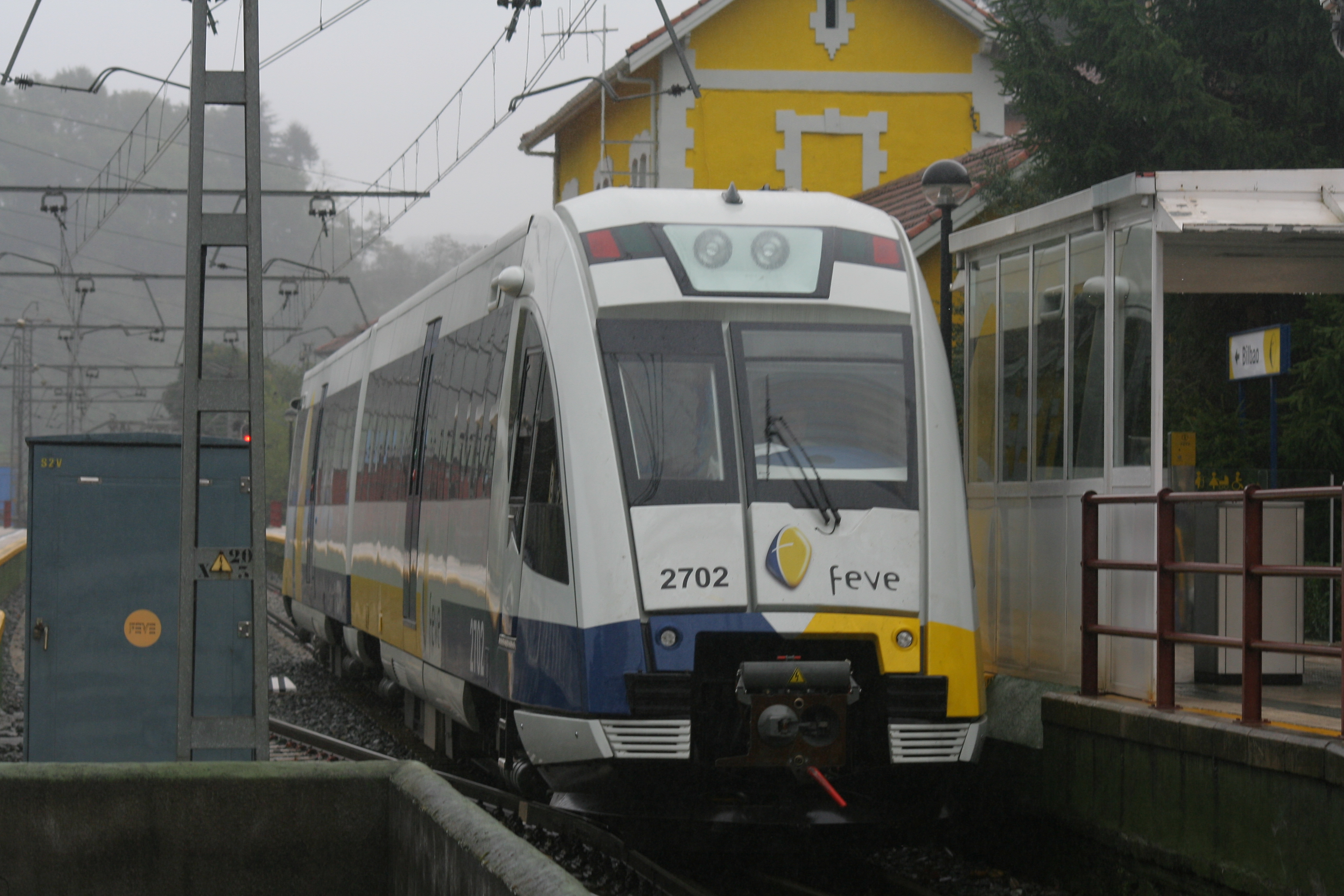 FEVE Serie 2700 en Balmaseda.